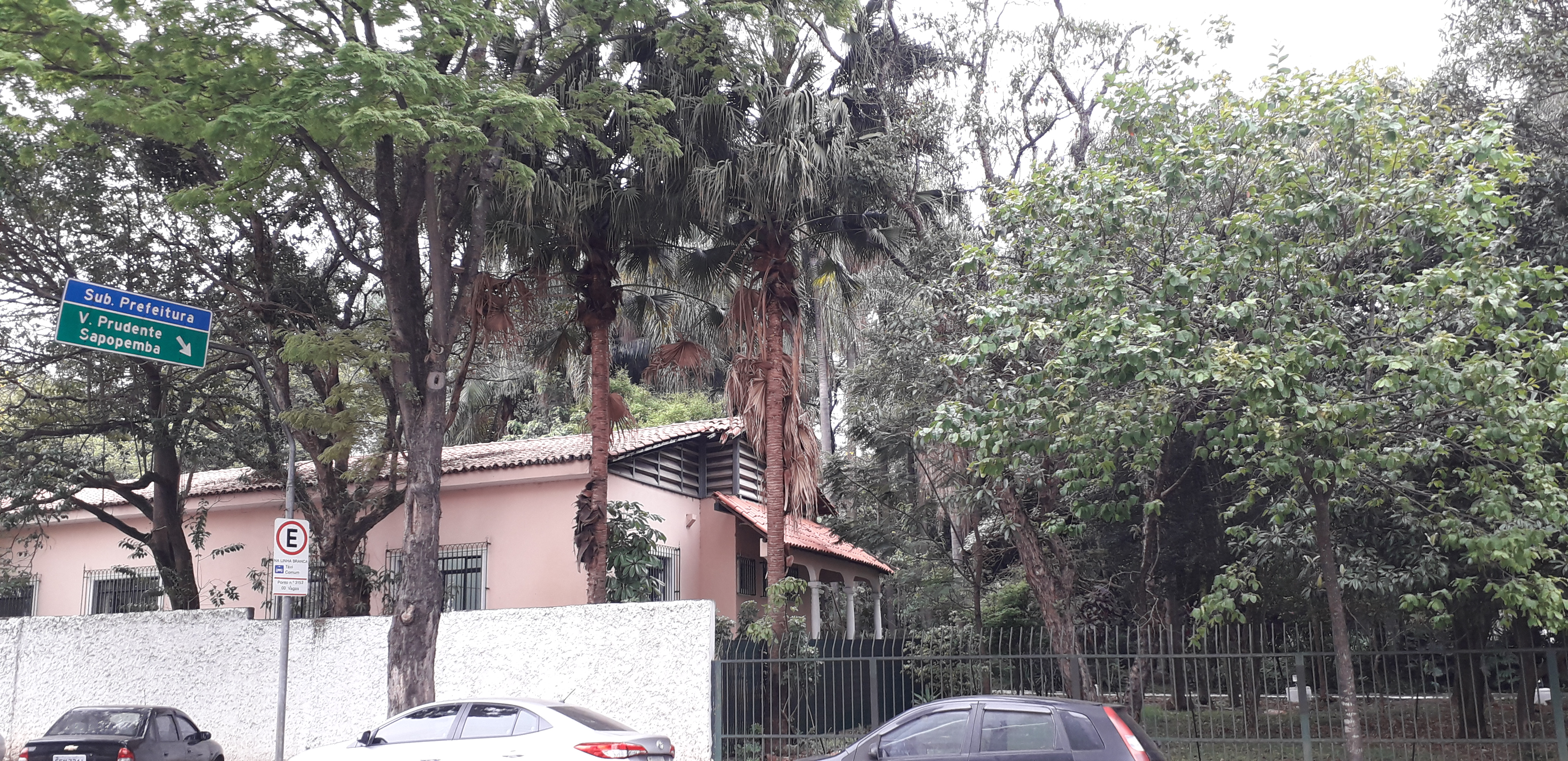 Subprefeitura da Vila Prudente e Sapopemba localizada no bairro.